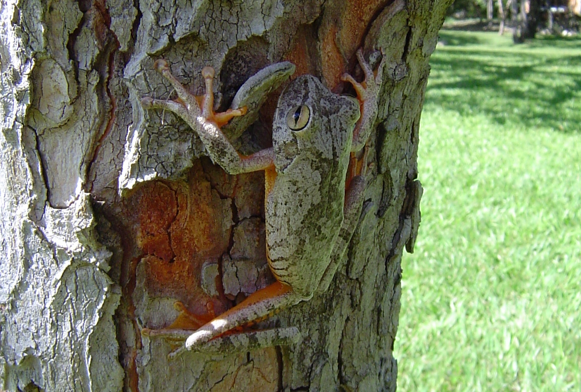 Anfíbio camuflado sobre tronco de árvore. SERRA DO CIPÓ - APA MORRO DA PEDREIRA.